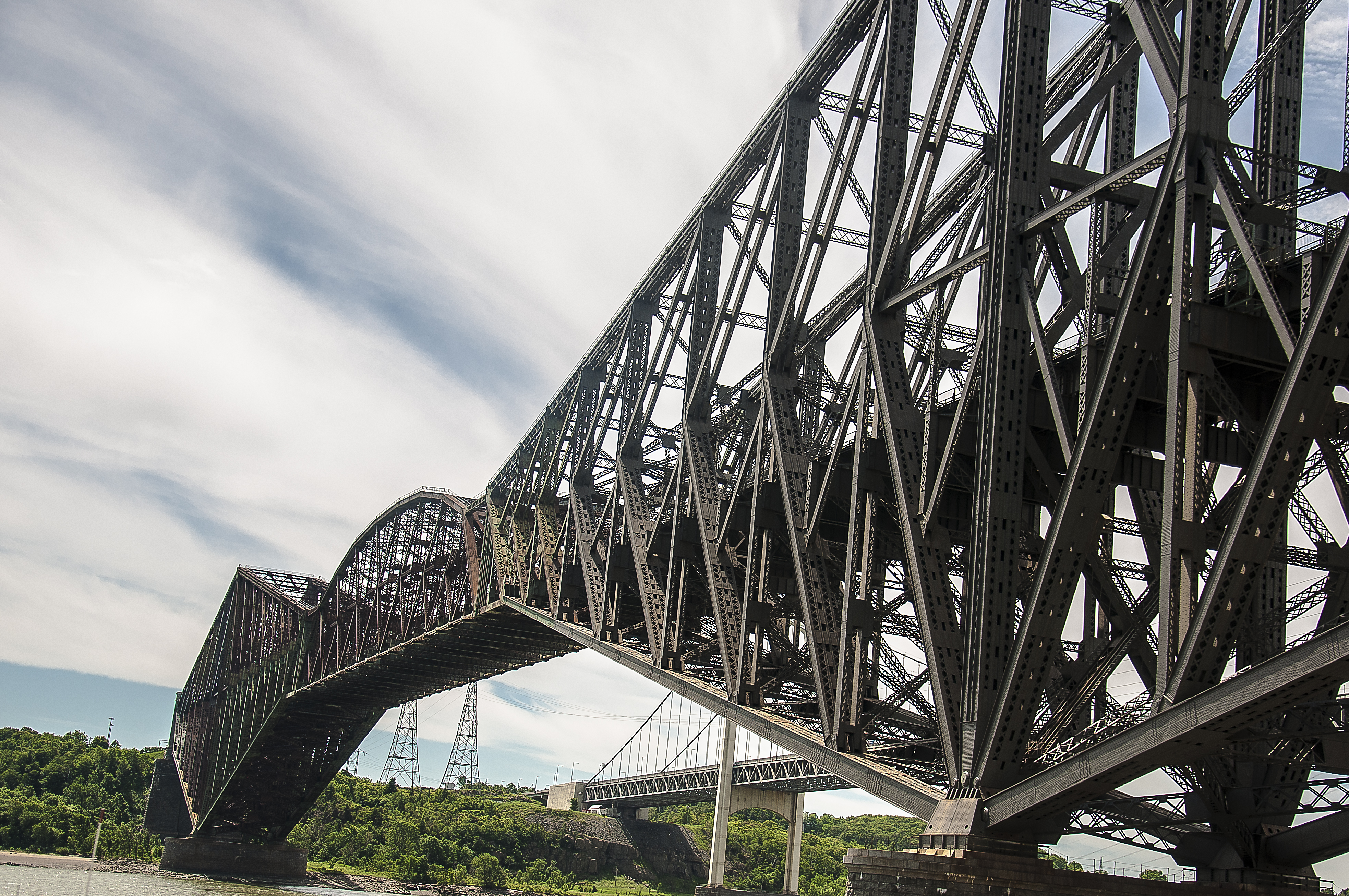 Le Pont de Québec, vu depuis le boulevard Champlain à Québec.